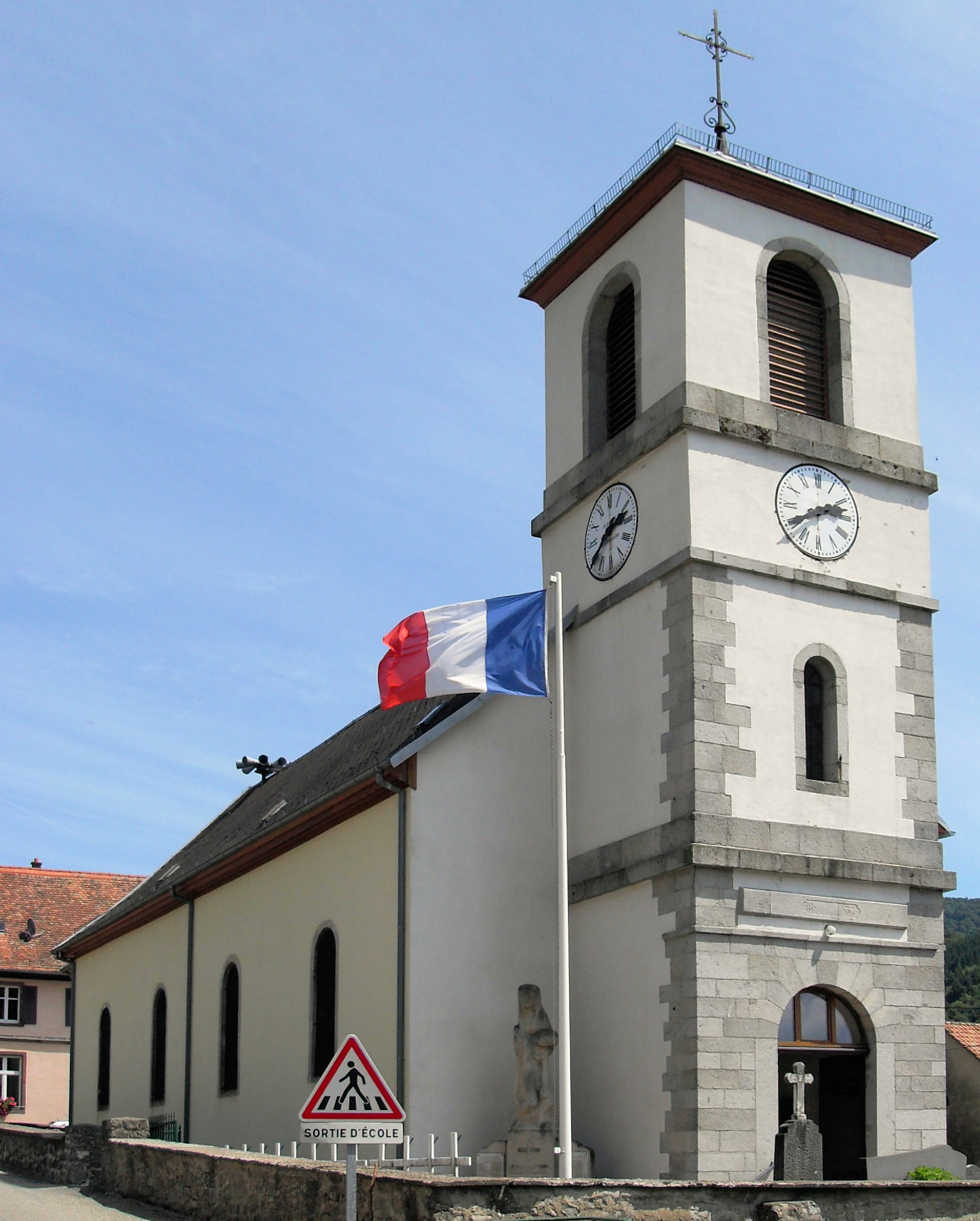 L'église Saint-Laurent à Goldbach-Altenbach